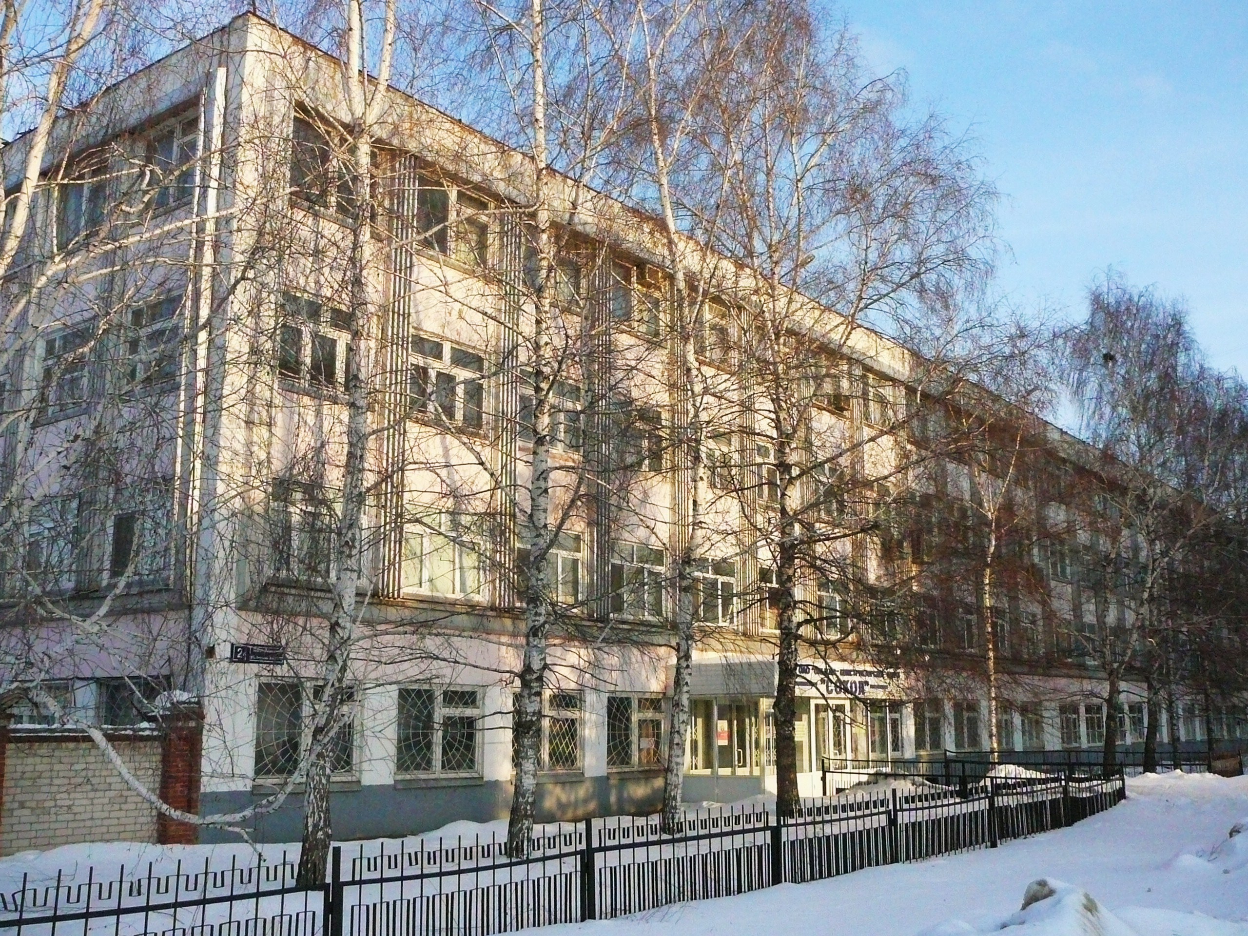 ОАО «Опытно-конструкторское бюро "Сокол"» (г. Казань, Авиастроительный район)